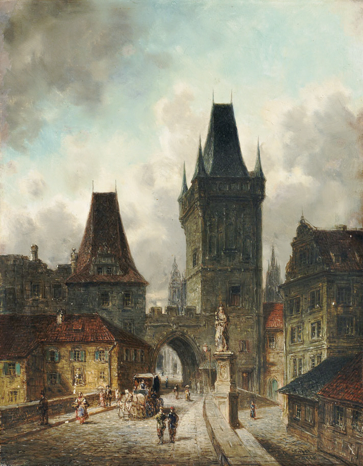 Christian Strobel (1855–1899?) Blick auf das alte Prag, 1886, Öl auf Holz. 30 x 23,5 cm